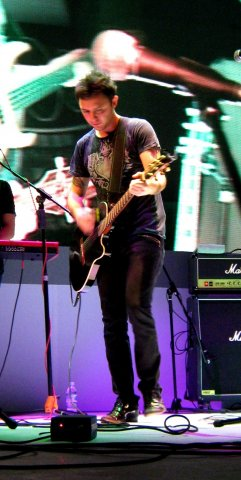 Роман Билык, основатель и лидер музыкальной группы «Звери», на концерте в московском клубе Б1 Maximum в честь финала Национального чемпионата России по набору SMS (18 октября 2009 года).